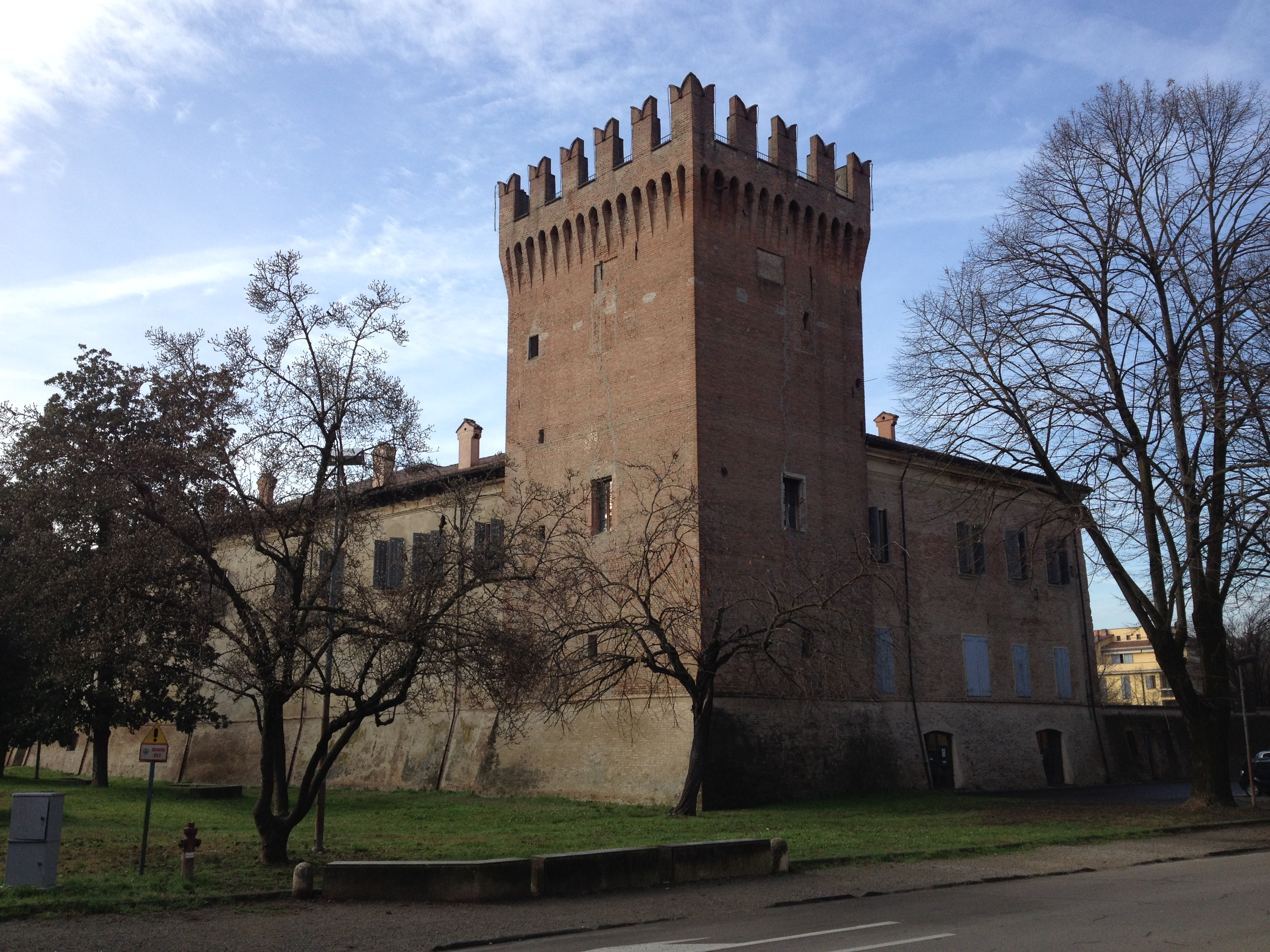 Dettaglio della Rocca di San Martino in Rio, provincia di Reggio nell'Emilia.